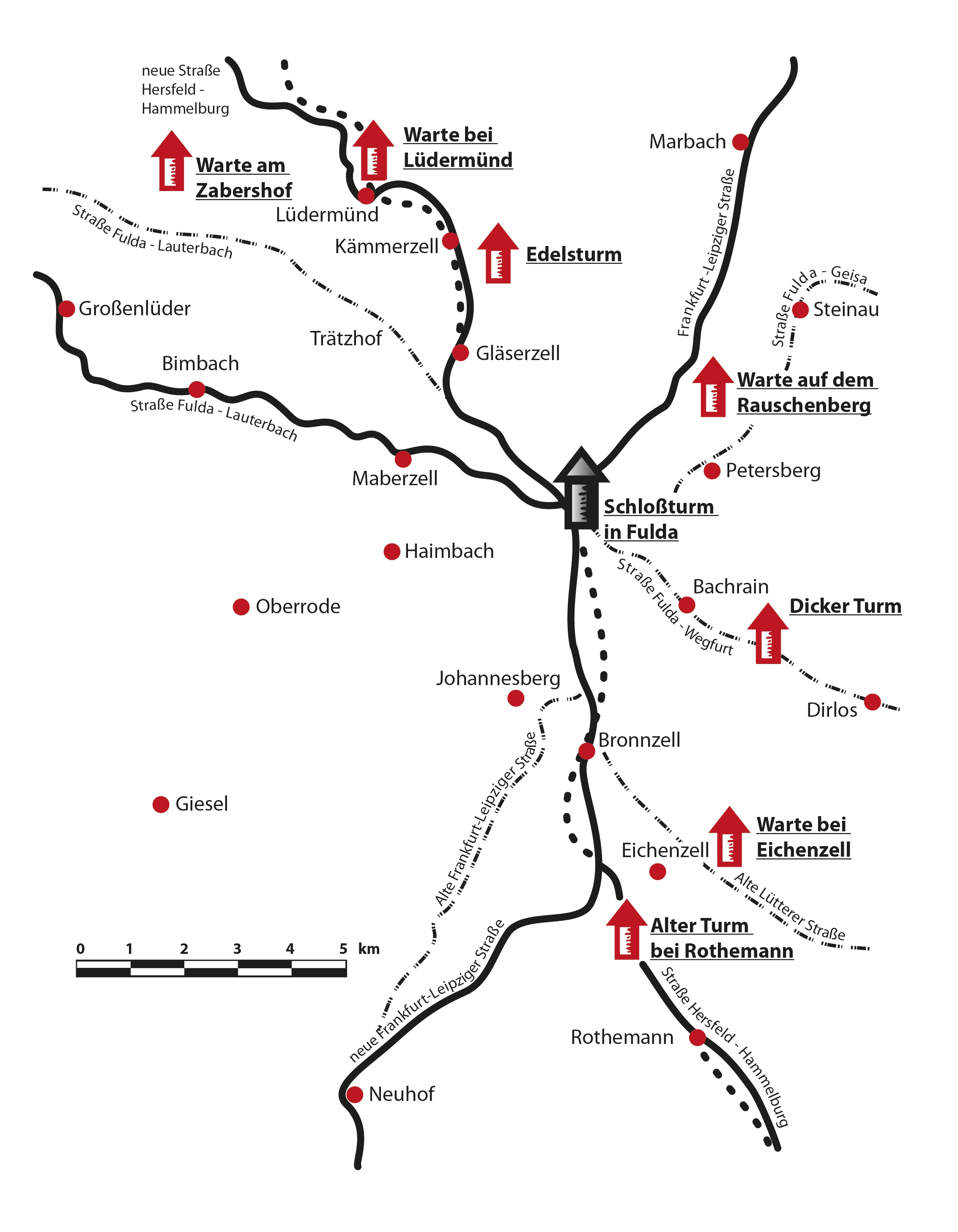 Lageplan der Warttürme im Landkreis Fulda